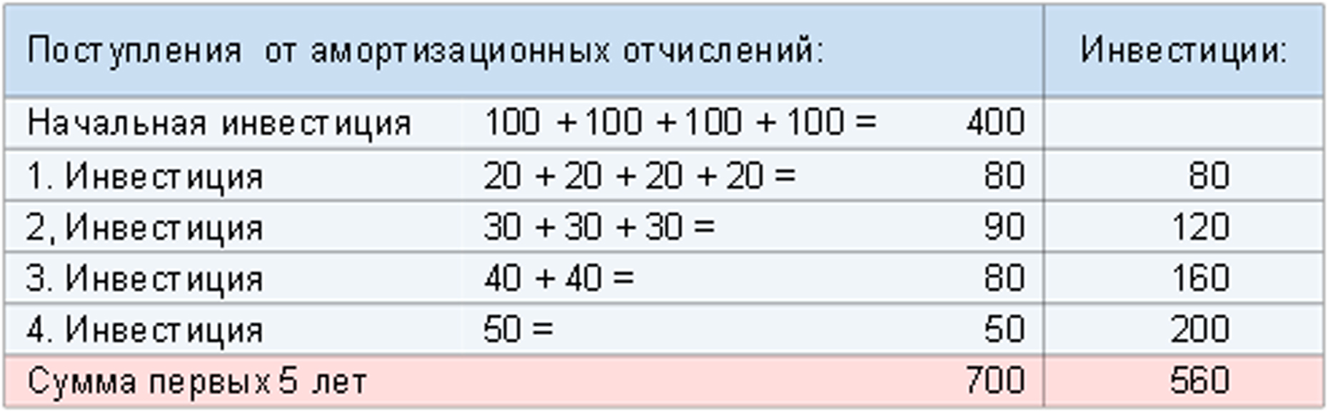 Амортизационные отчисления и инвестиции